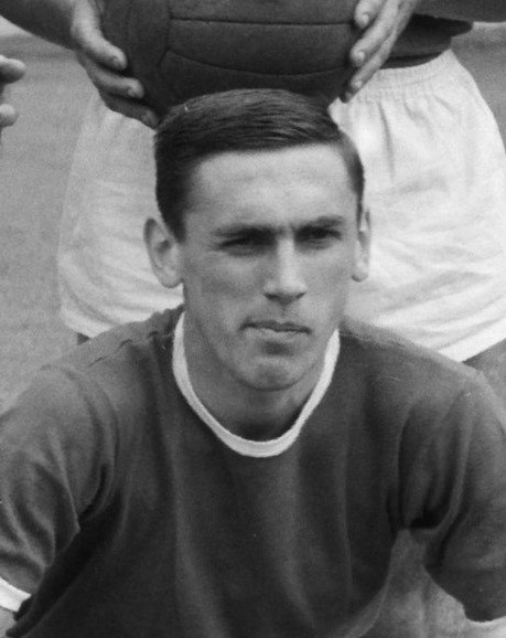 Donald Feldmann in 1960.